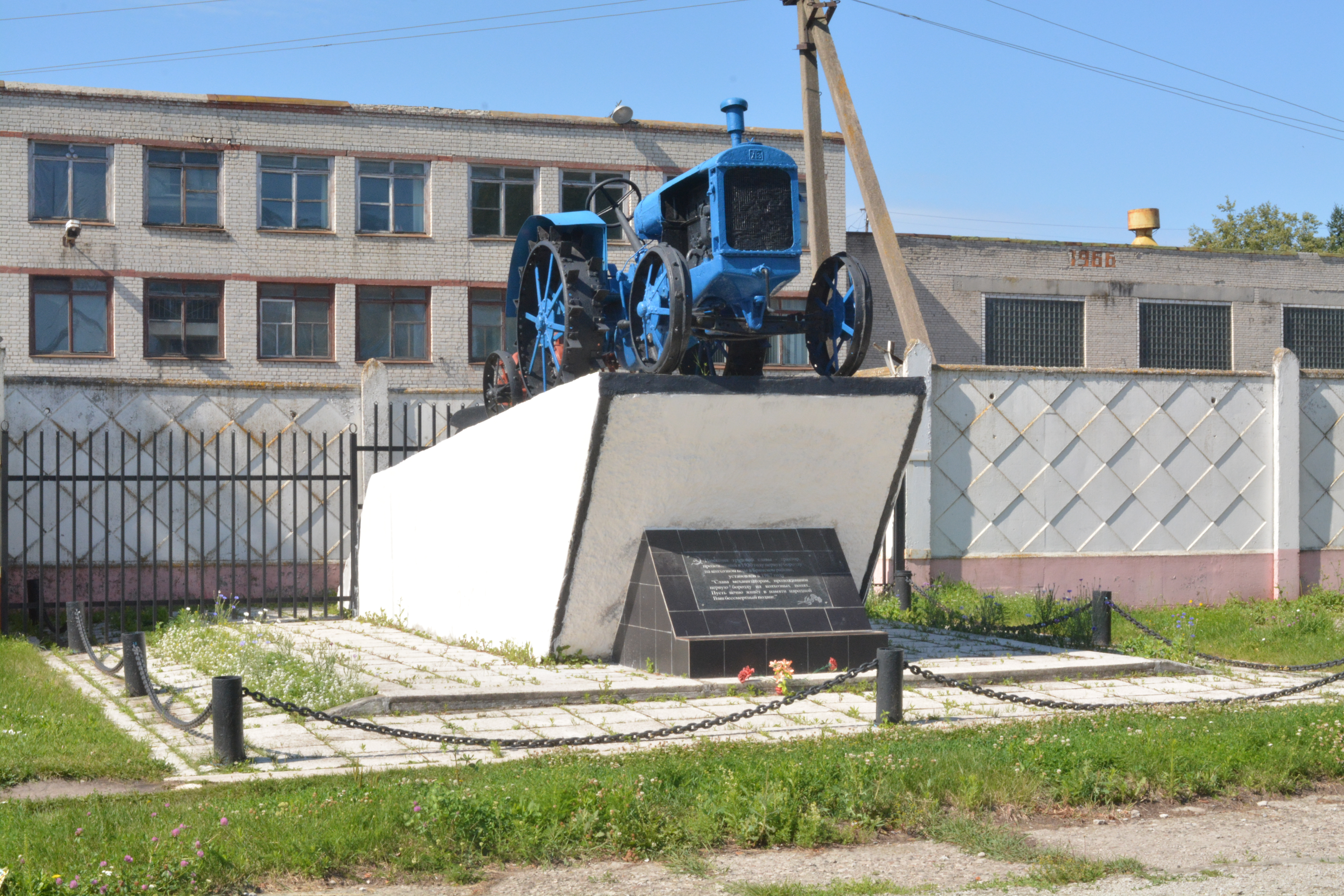 Трактор ХТЗ, проложивший первую борозду на колхозном поле в Брянском районе: Глинищево, Брянский район, Брянская область